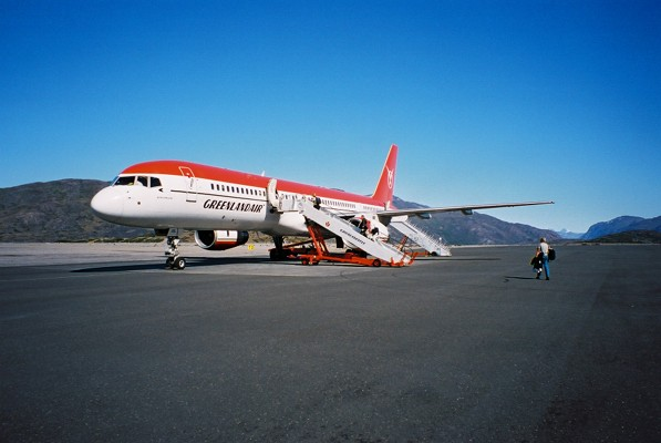 Boeing 757-200 della Greenlandair (Air Greenland)